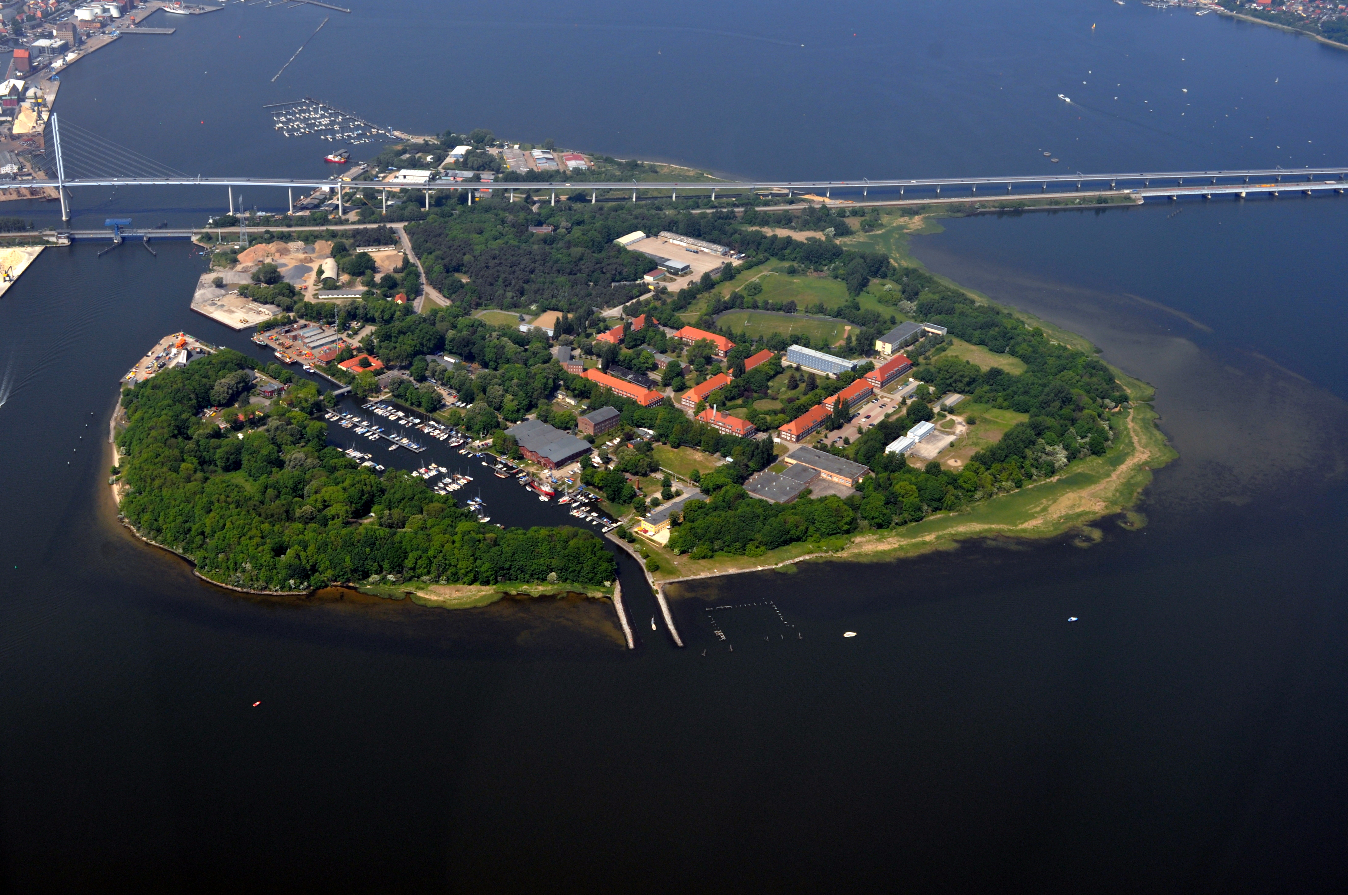 Die Bilder wurden von mir während eines einstündigen Rundflugs ab Flugplatz Güttin am 21. Mai 2011 aufgenommen. Die Bildbeschreibung steht im Dateinamen. Aufgenommen mit einer Nikon D5000 durch das Seitenfenster des Flugzeugs.